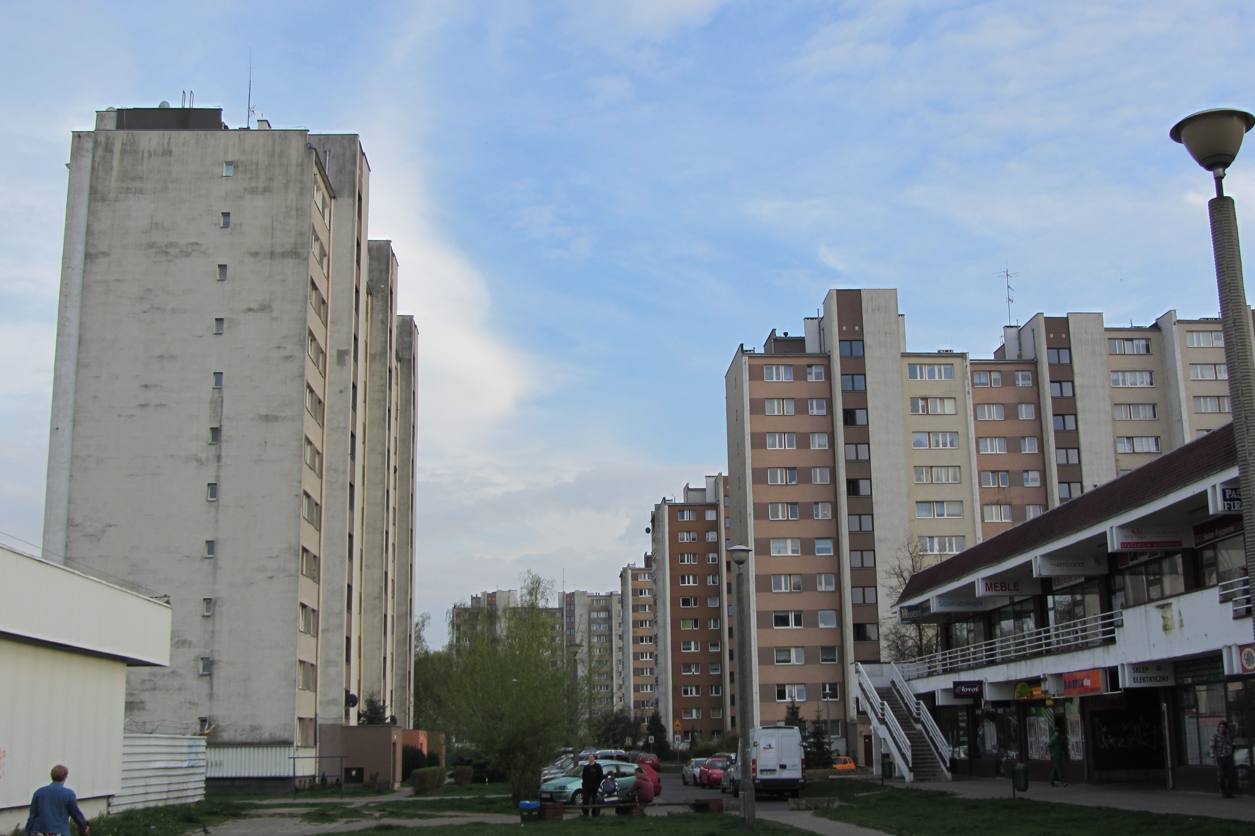 Plattenbau in Opole-Zaodrze